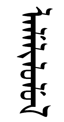 лалэлилолу